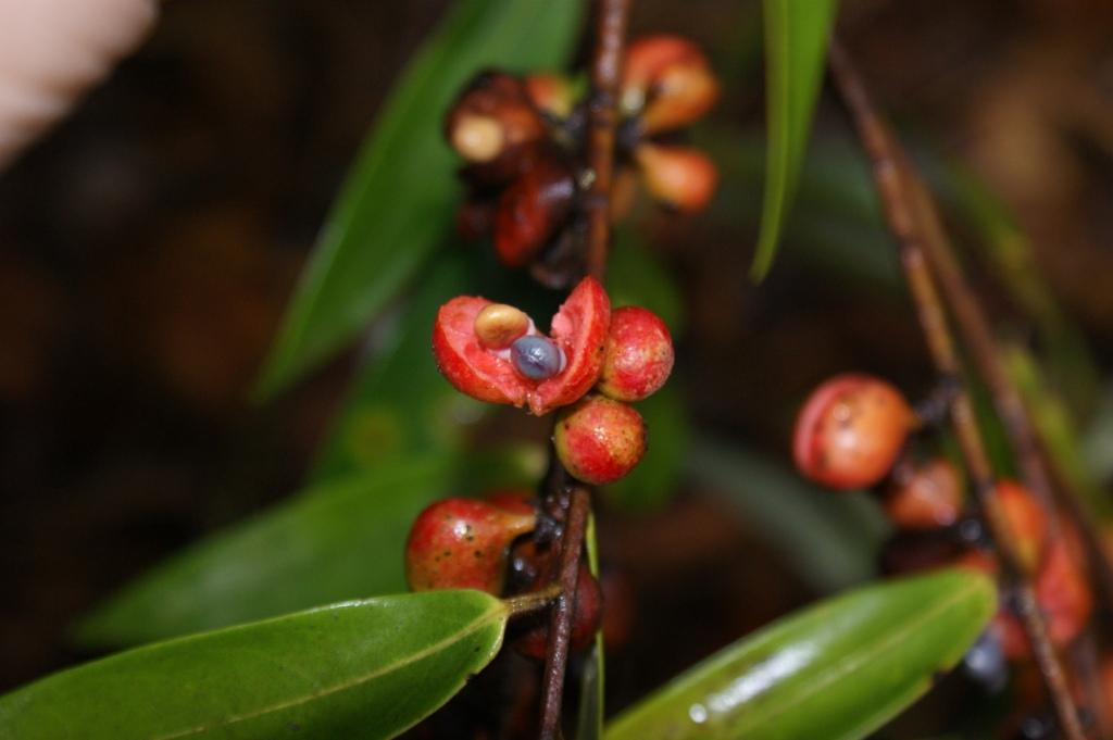 Xylopia sericea - ANNONACEAE Jardim Botânico de Brasília - Distrito Federal - Brasil.